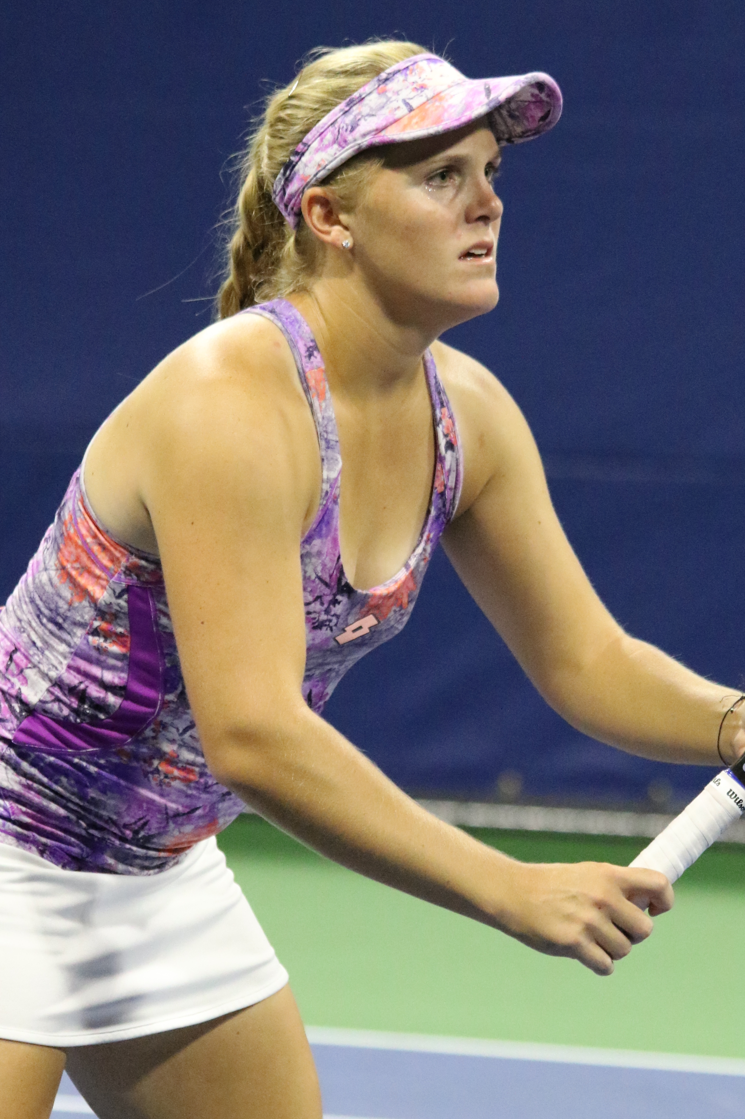 Oudin US16 (2)